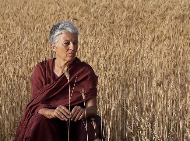 Sista Bramini